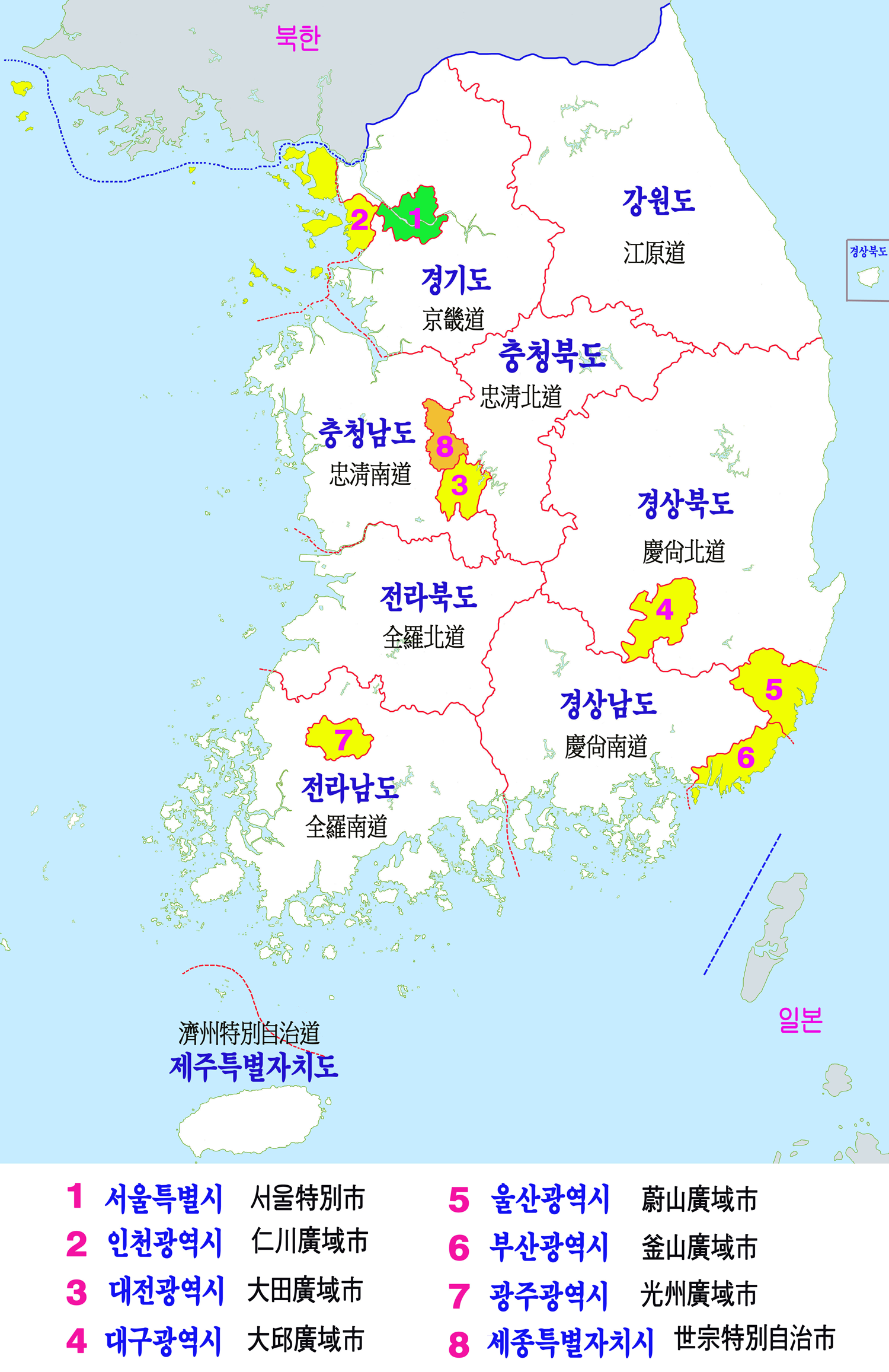 대한민국 행정구역 지도